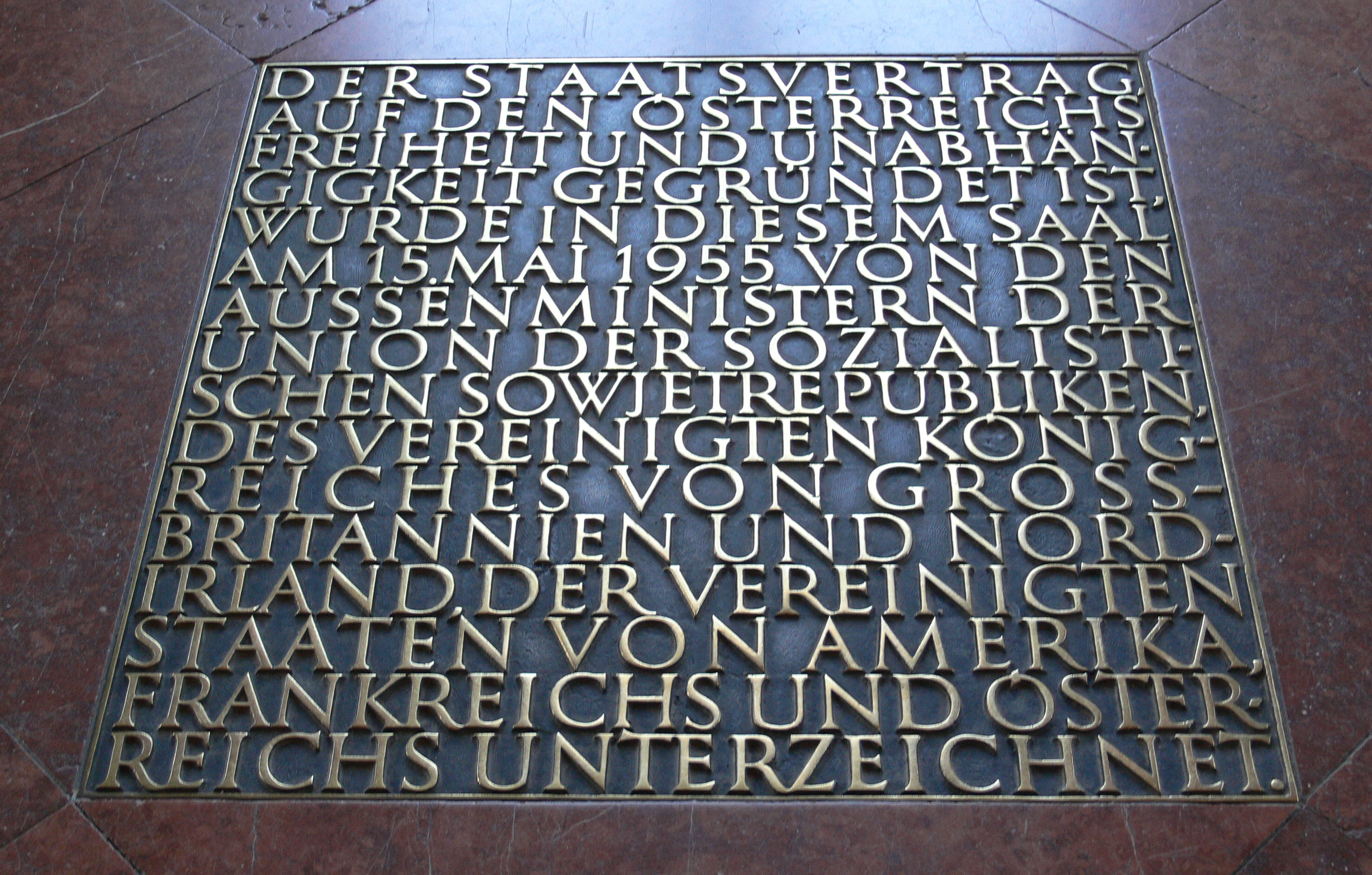 Wien, Oberes Belvedere, Marmorsaal, Gedenktafel im Fußboden zum Andenken an die Unterzeichnung des Österreichischen Staatsvertrags 1955